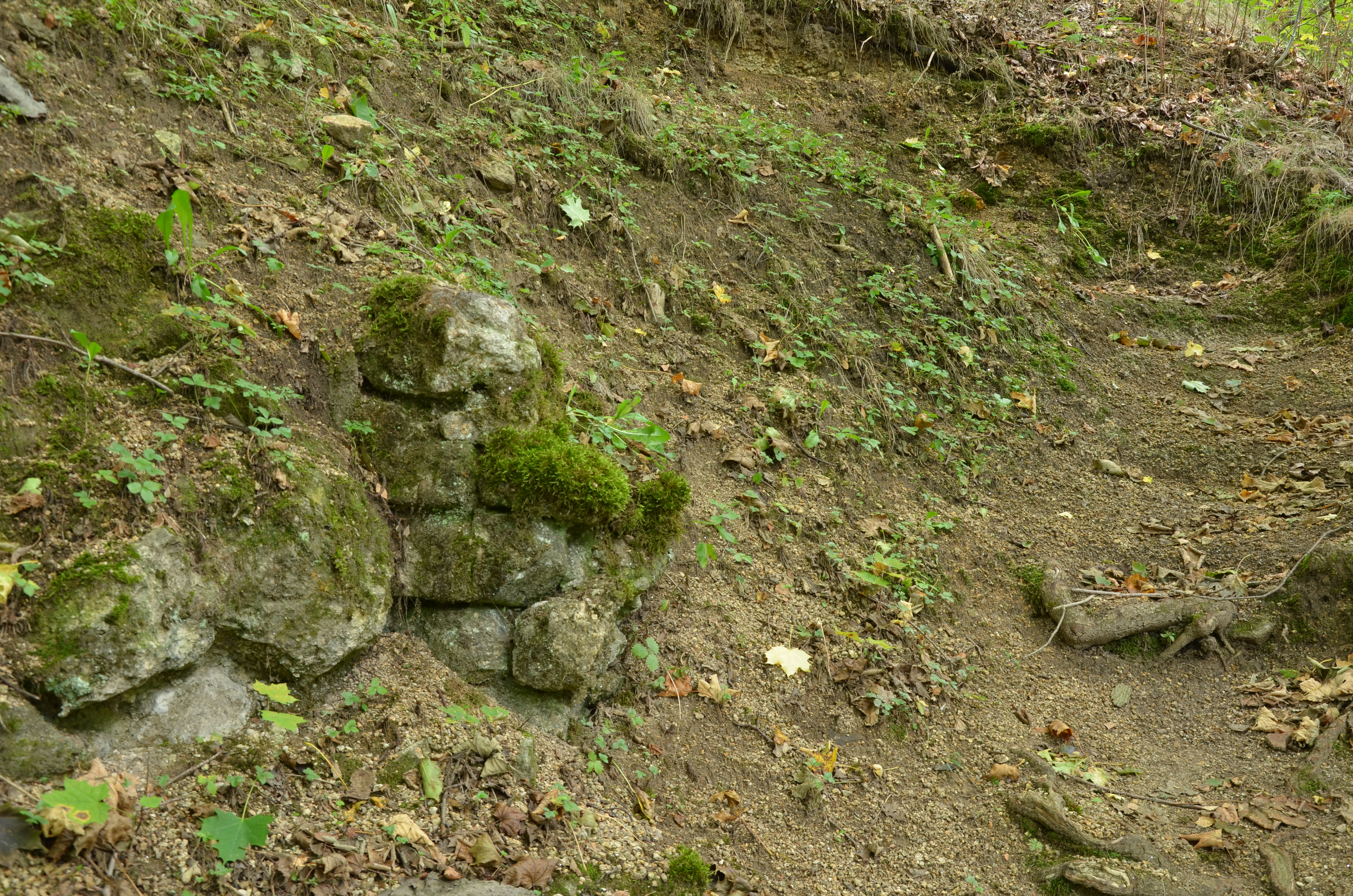 Úbočí - Hrad Borschengrün - Fragment zdiva ve svahu severní části hradu